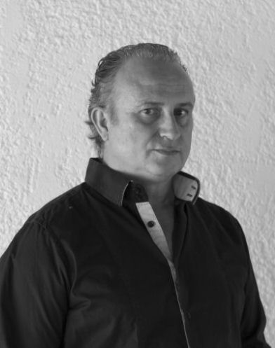 Juan Antonio Abellán Juliá.